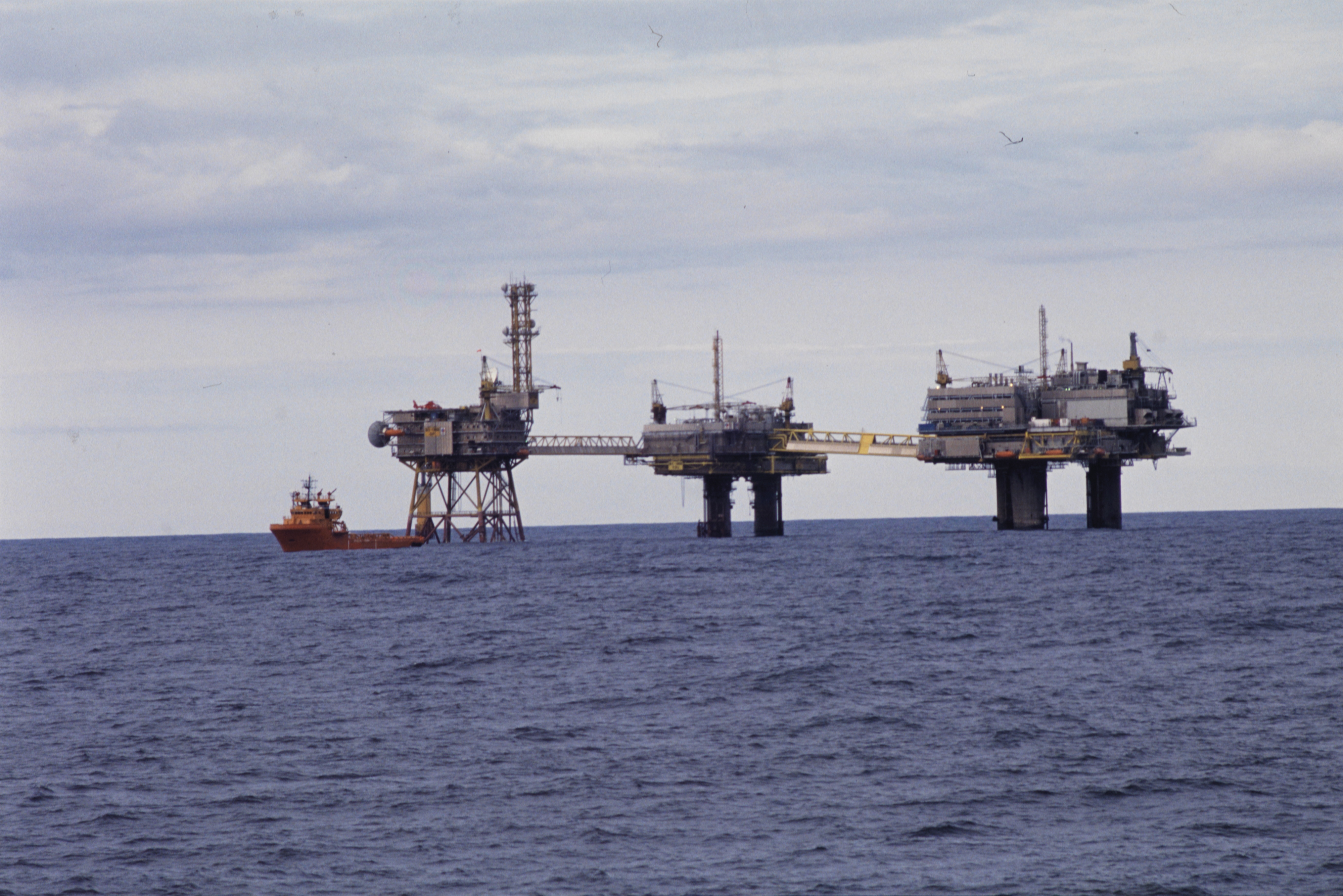 Foto av oljeplatformer på Friggfeltet. Operatør Elf. Blokk 25/1 25/2. Fra venstre: Frigg QP, Frigg TP1 og Frigg TCP2. De to førstnevnte står i britisk sektor, TCP2 i norsk sektor